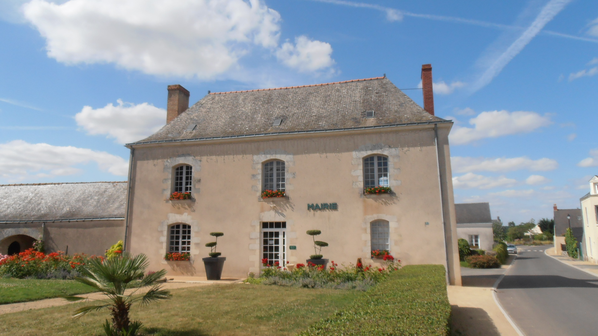 la mairie